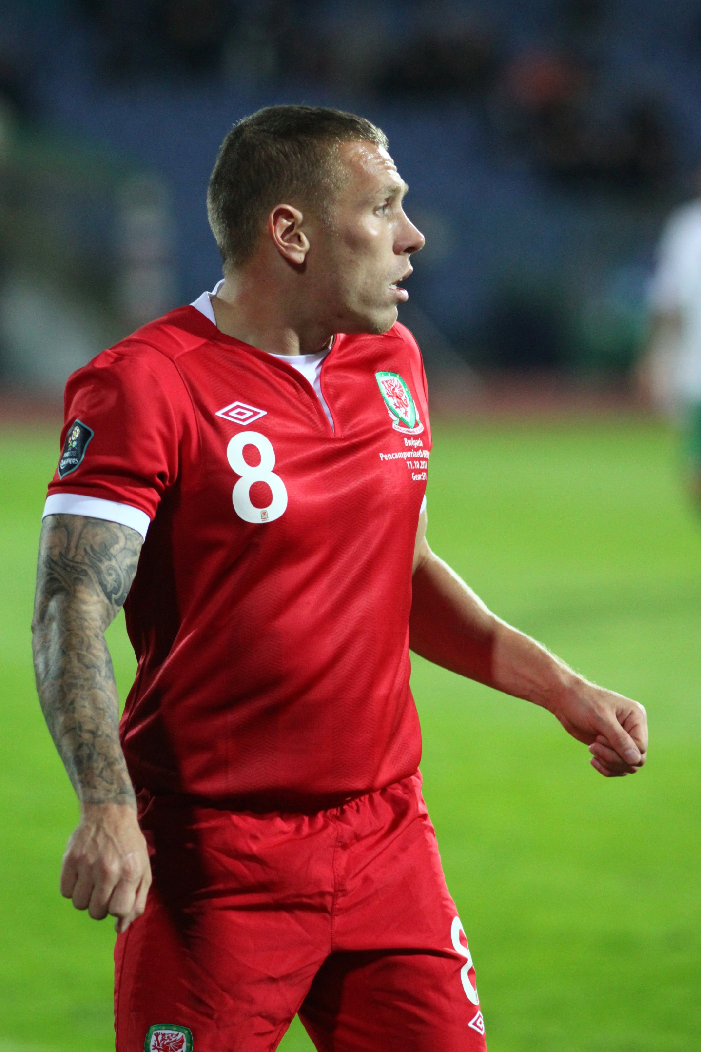 Крейг Белами по време на мача България-Уелс 0-1